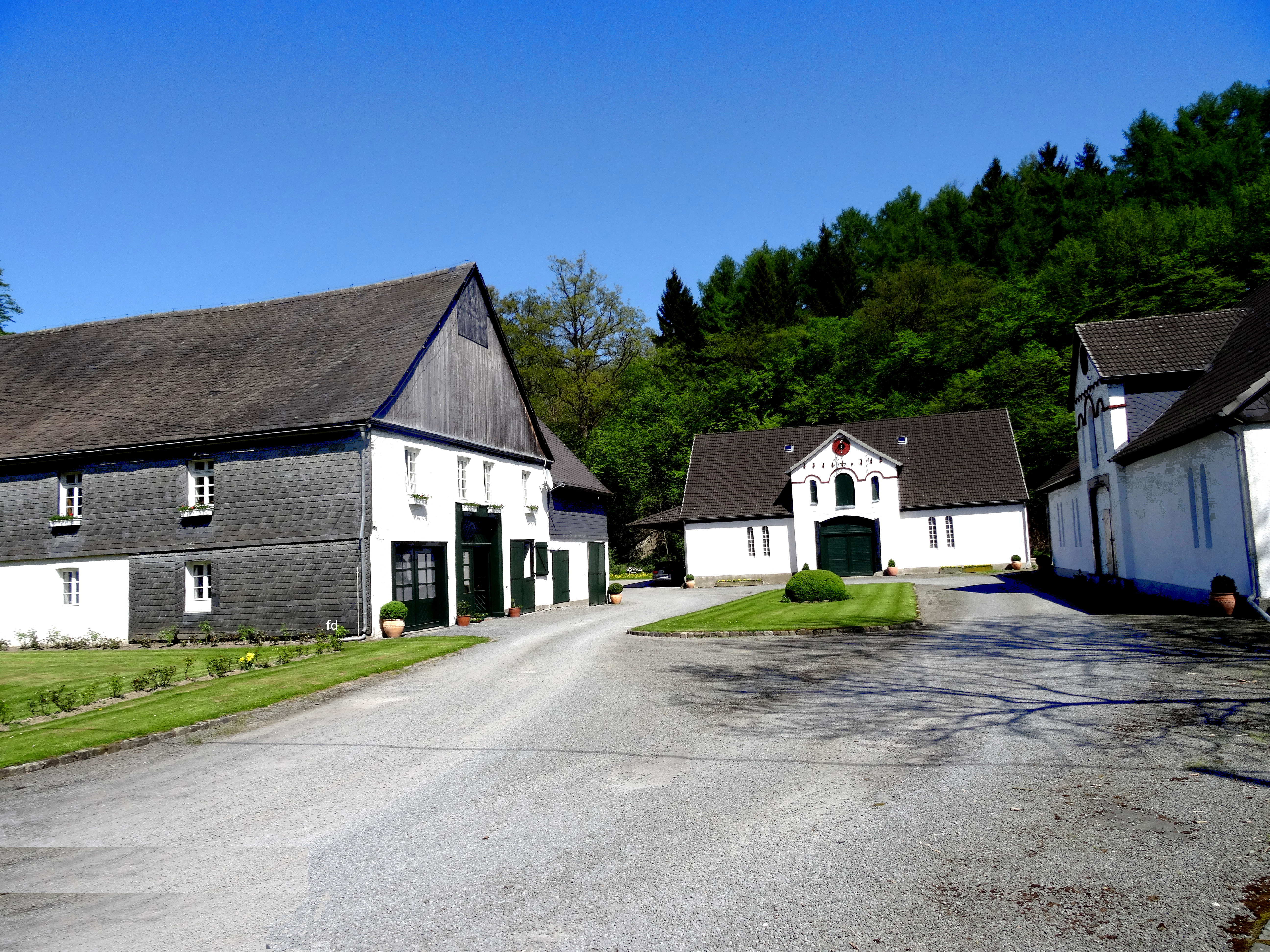 Calle Gut Stesse zwischen Calle und Wennemen